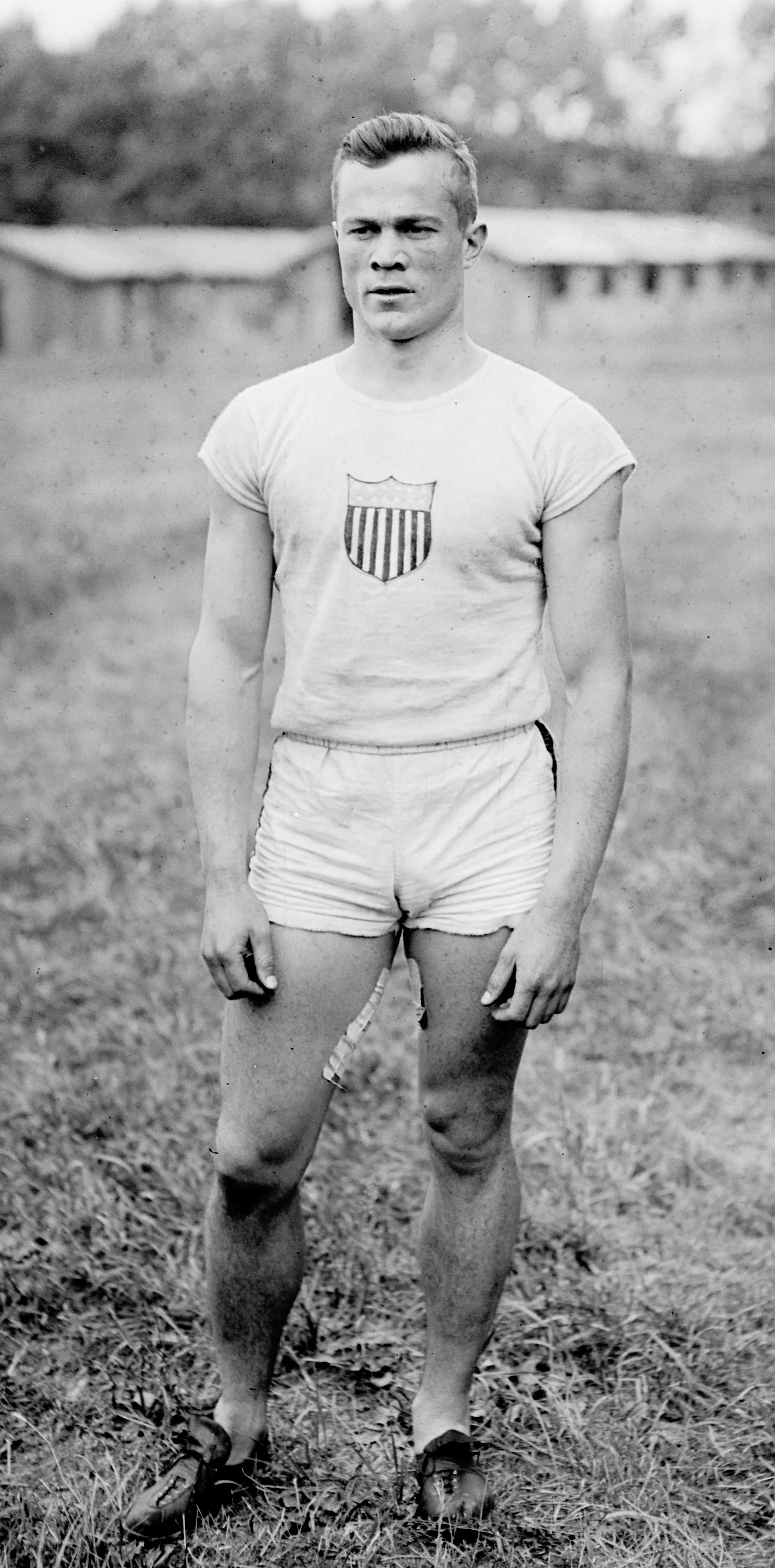 28-8-20, Colombes, Morris Kirksey (Américain), vainqueur d'un 200 m.